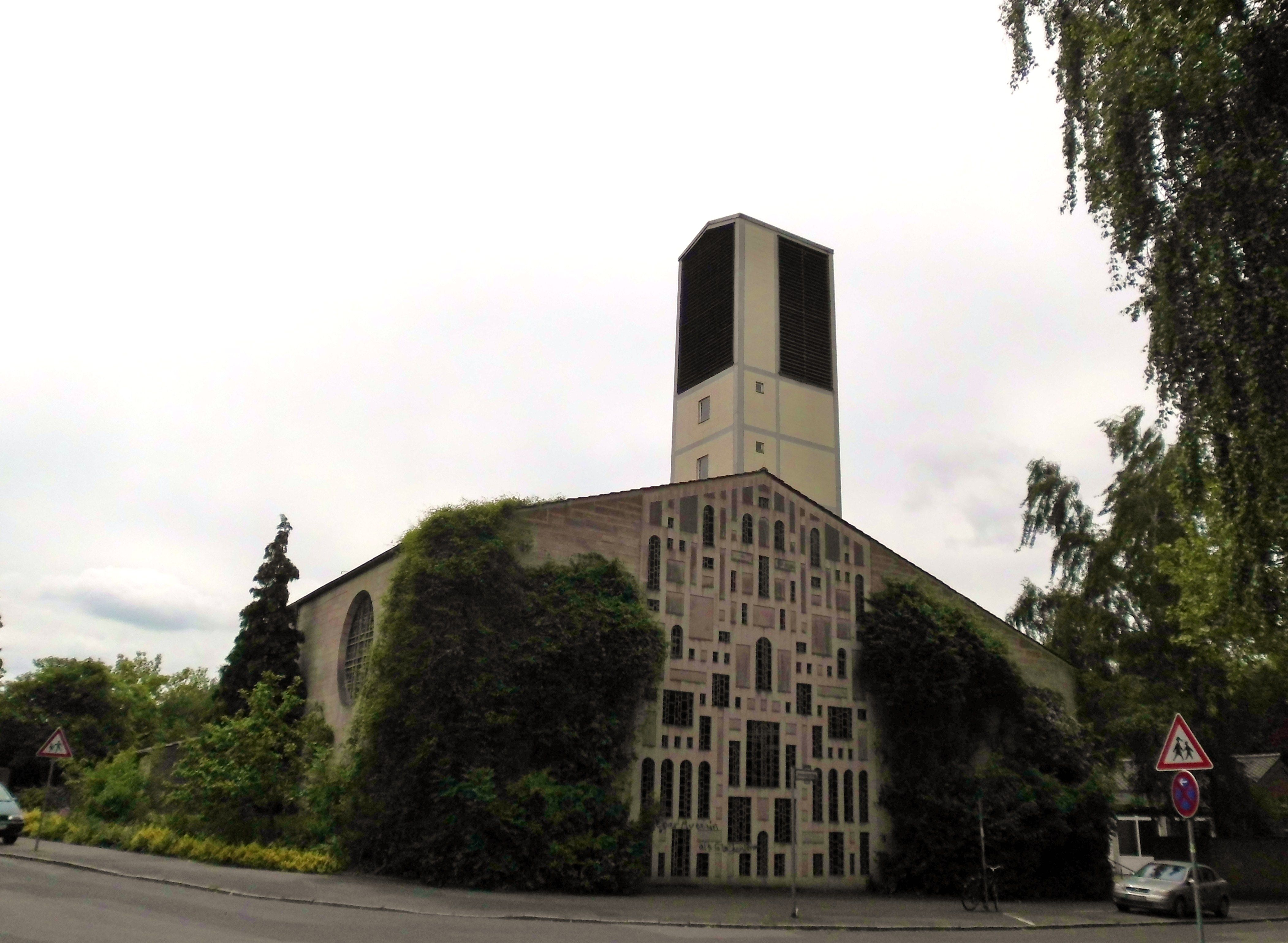 Kreuzkirche in der Südstadt von Göttingen, aufgenommen von der Kreuzung Immanuel-Kant-Straße/ Königsberger Straße. Erbaut 1957 von dem Göttinger Architekten Diez Brandi, als Ensemble mit den beiden angrenzenden Schulen (heute Herman-Nohl-Schule und HG Junior).